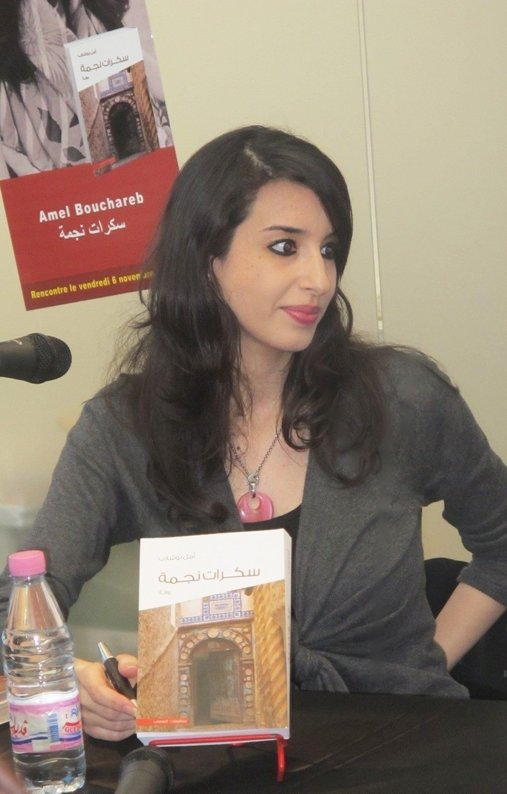 الكاتبة أمل بوشارب خلال تقديم رواية سكرات نجمة بالصالون الدولي للكتاب بالجزائر 2015